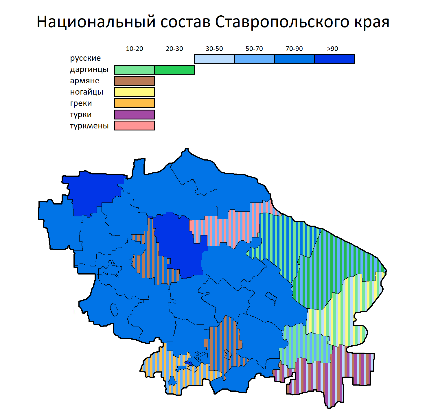 Национальный состав Ставропольского края по муниципальным образованиям